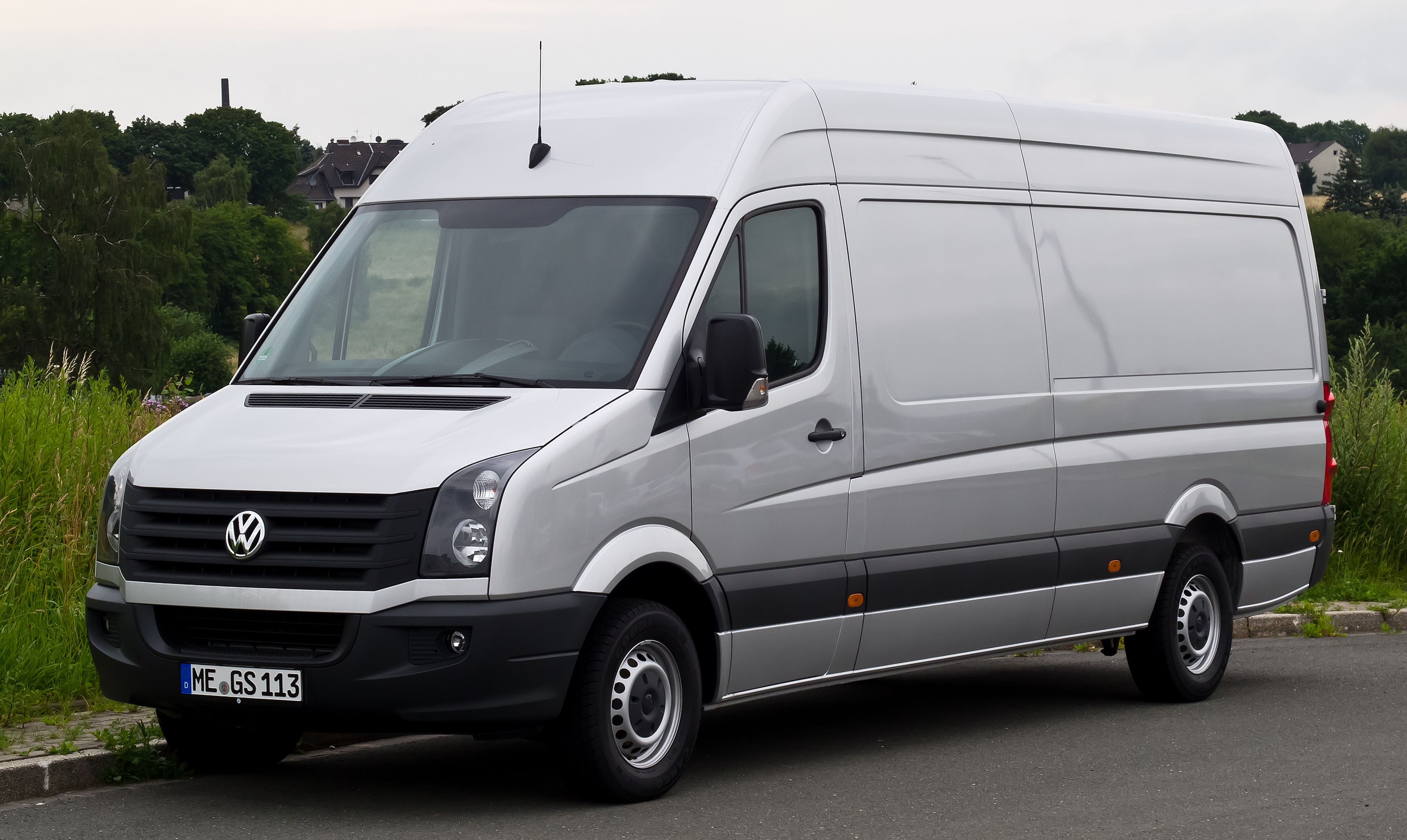 VW Crafter 2.0 TDI (Facelift)